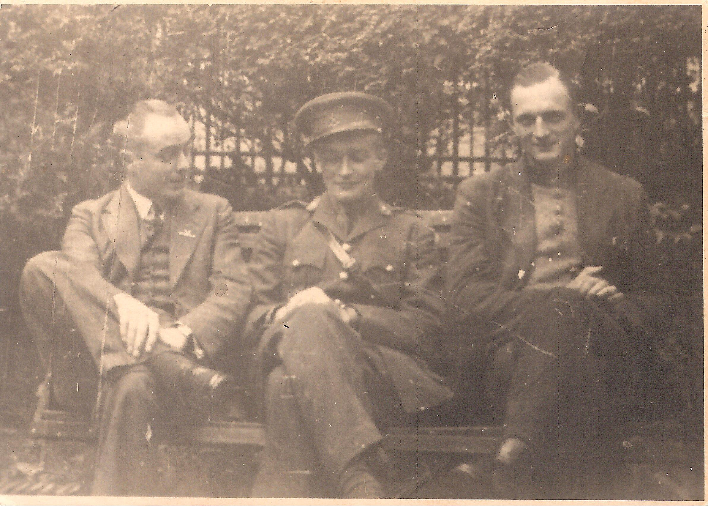 Jan Emmer tussen broers Martin en Reijer tijdens zijn opleiding tot geheim agent in Engeland.